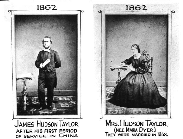 Die beiden Original-Bilder befinden sich in meinem Besitz. Ich habe sie vor Jahren von der Überseeischen Missionsgemeinschaft - durch Vermittlung einer Bekannten - geschenkt bekommen. Die Überseeische Missionsgemeinschaft ist die Nachfolgeorganisation der China-Inland-Mission